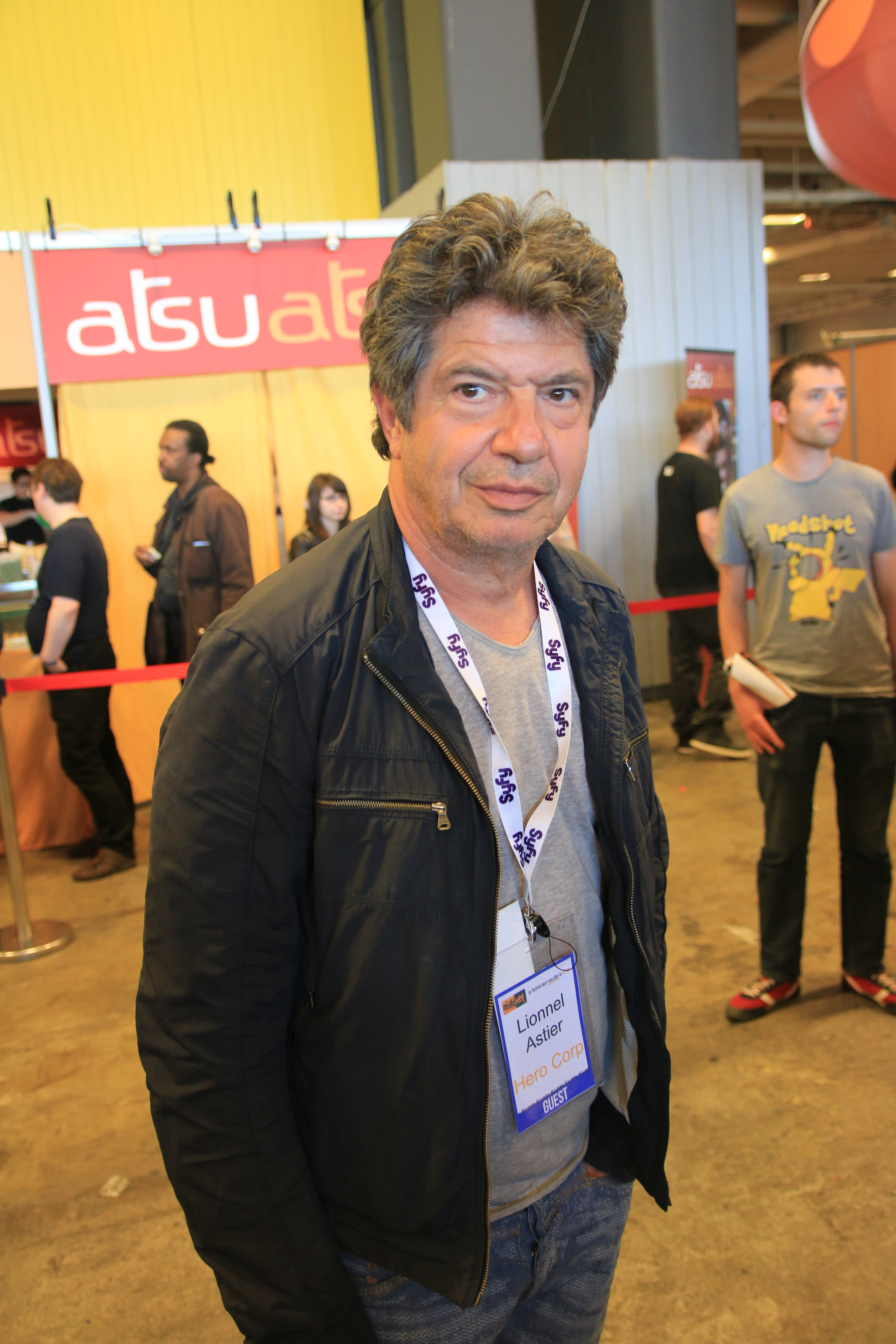 Le comédien Lionnel ASTIER lors de Geekopolis 2014